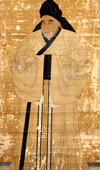 1683년에 제작된 우암 송시열 전신상